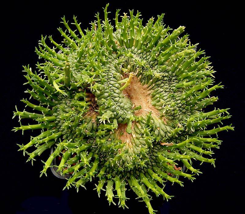 Euphorbia flanaganii fa. cristata